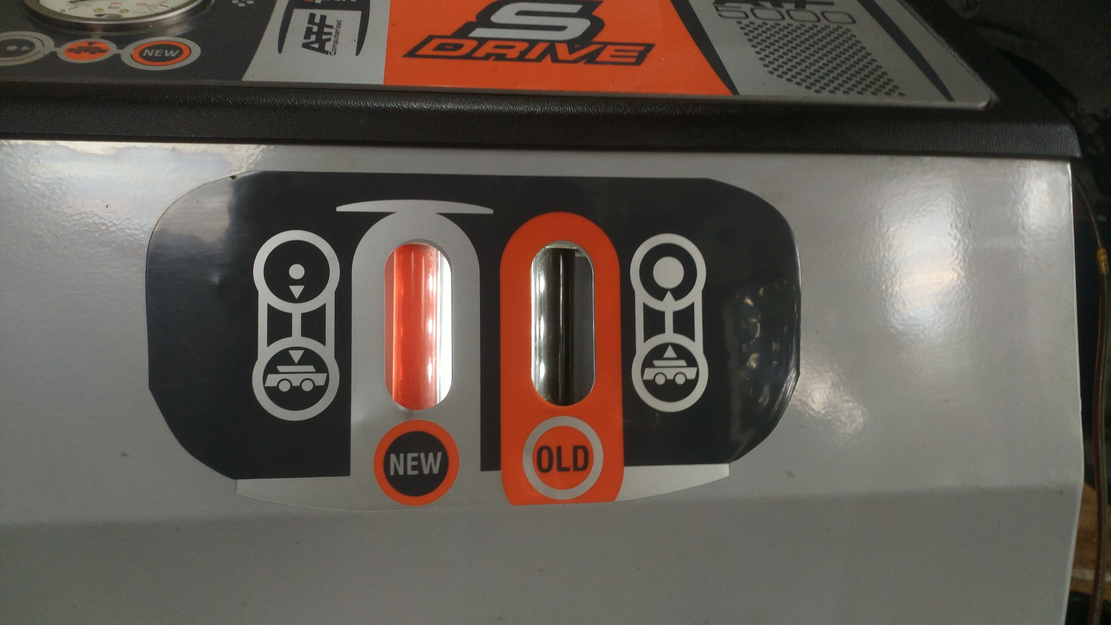 Wzierniki ukazujące różnicę między starym i nowym olejem w skrzyni.